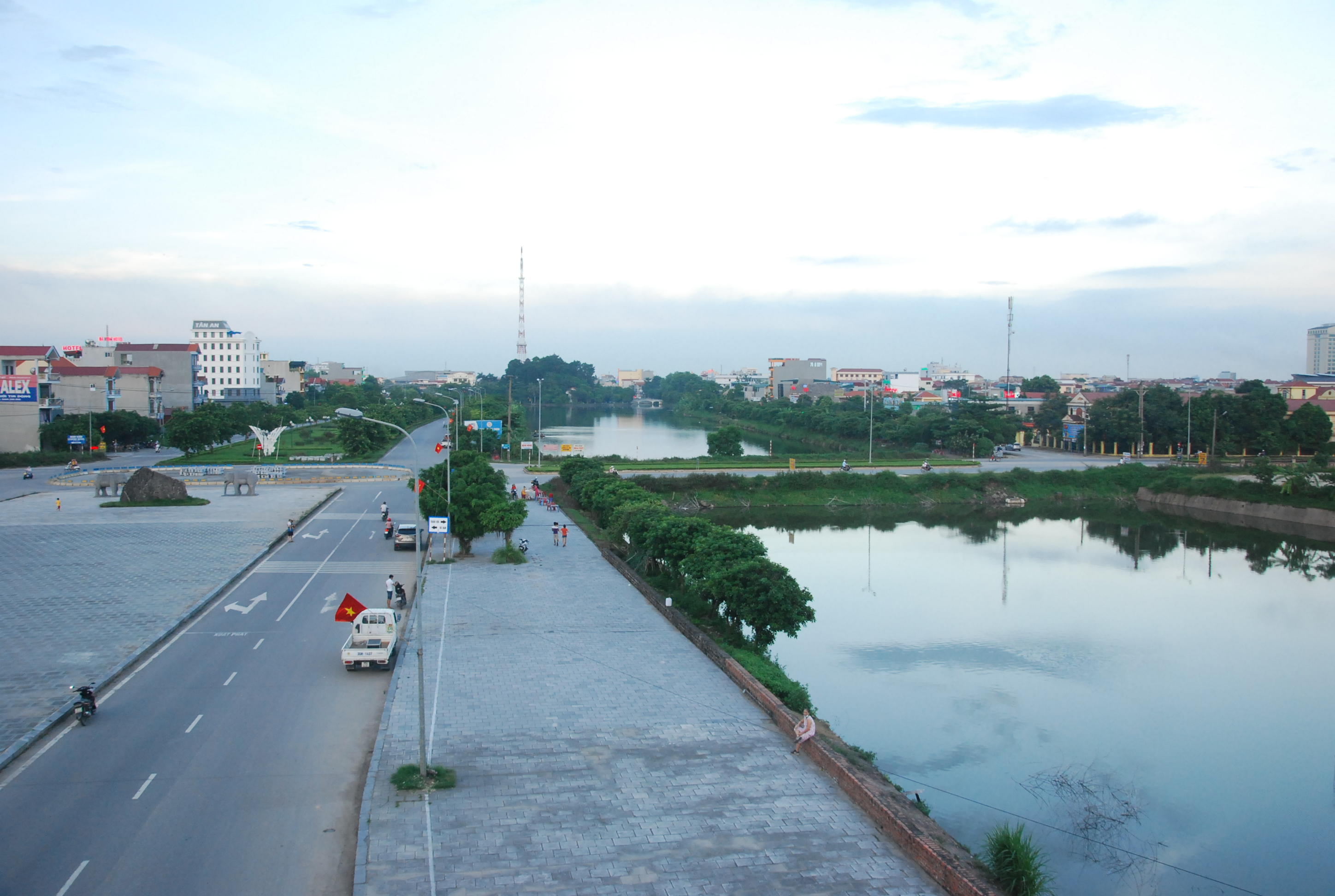 Phong cảnh khu vực Cổng Tràng An ở thành phố Ninh Bình